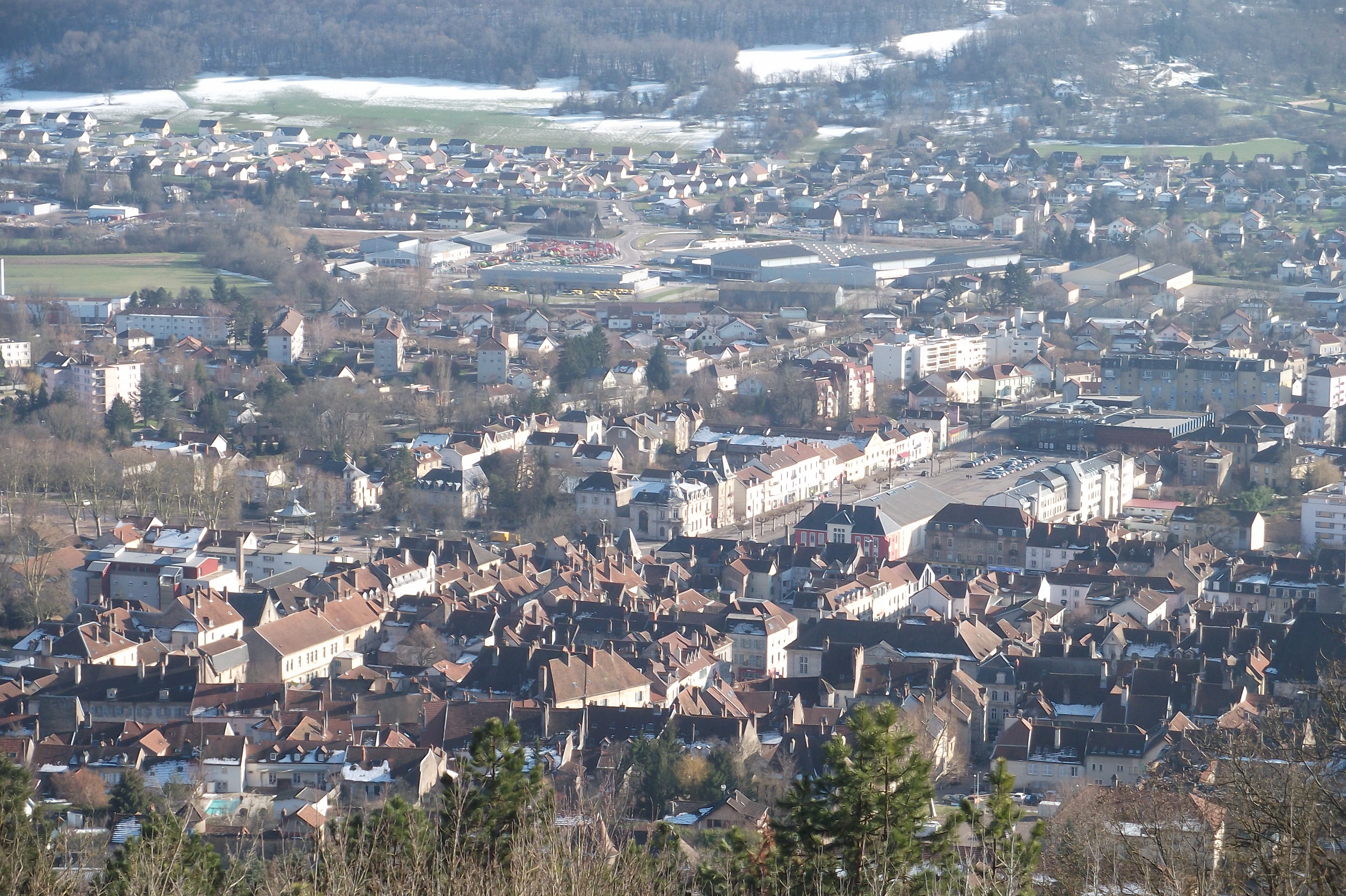 Vesoul vue depuis la Motte